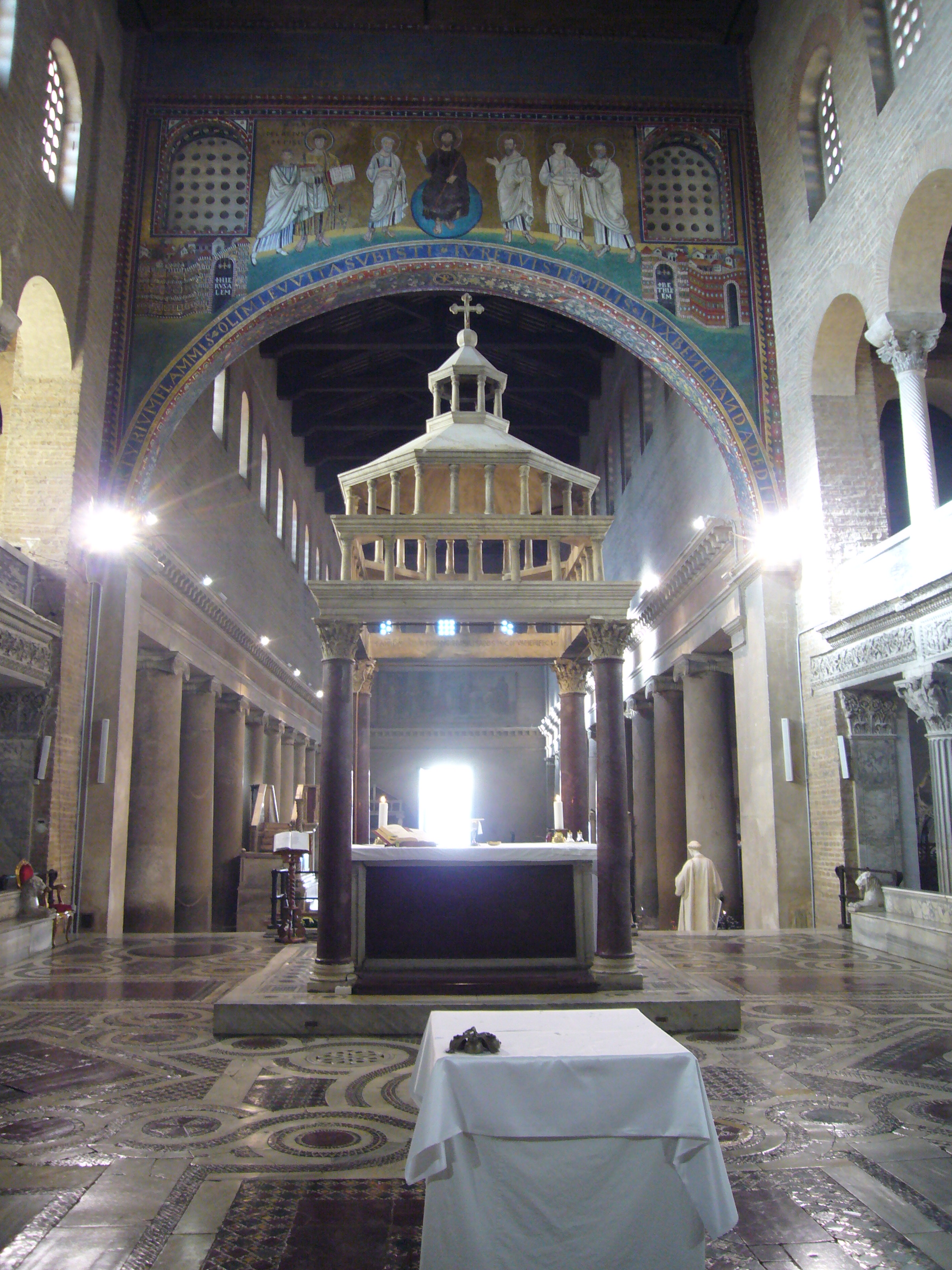 Roma, san Lorenzo fuori le mura: ciborio e arco trionfale della basilica pelagiana visti dal trono papale